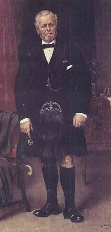 John Brown, służący królowej Wiktorii Hanowerskiej.